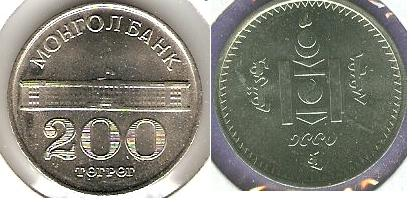 Moneda de 200 Tugrik, 1994.